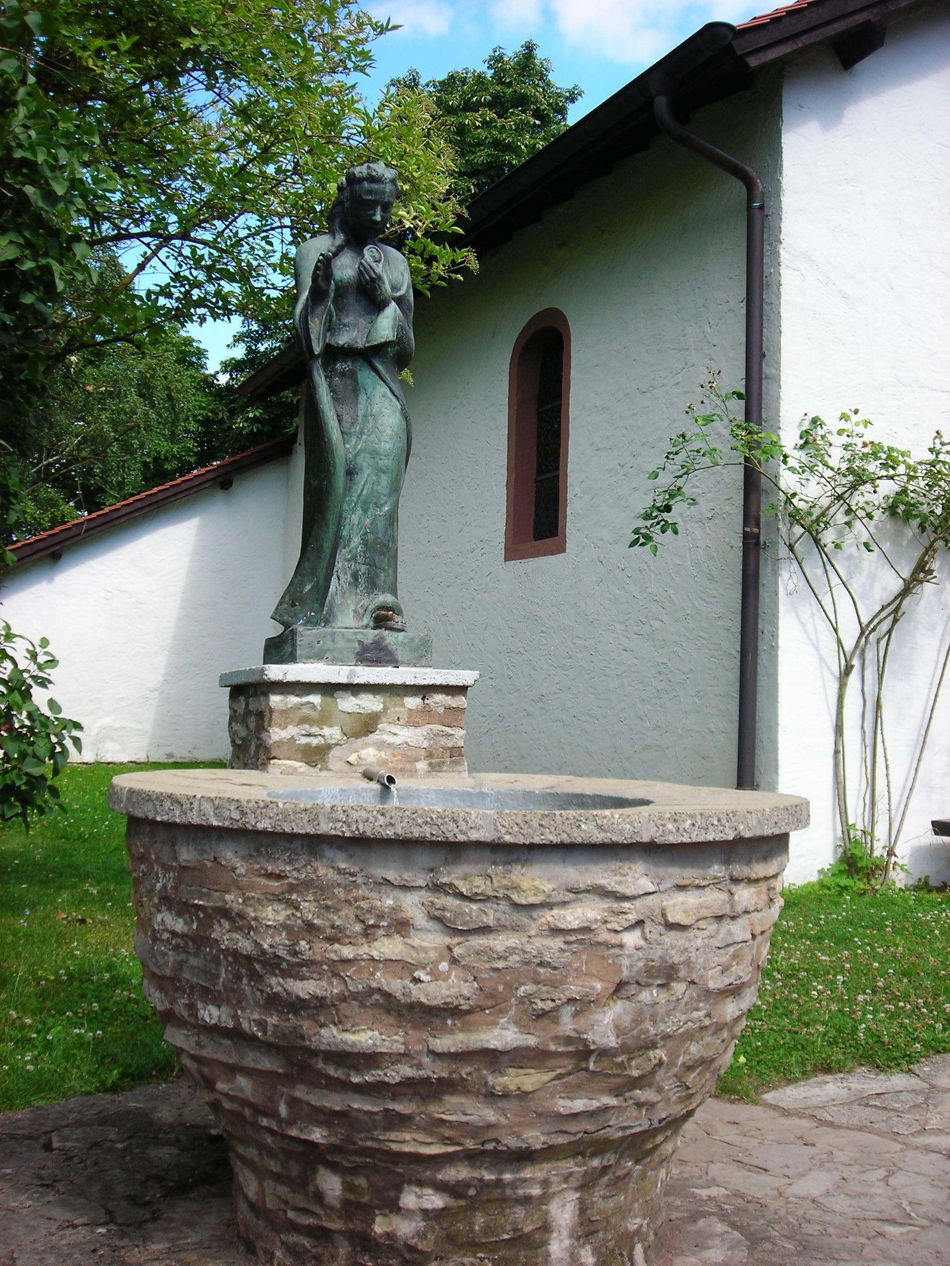 Fontaine devant la chapelle Ste Oranne de Berus (Allemagne)